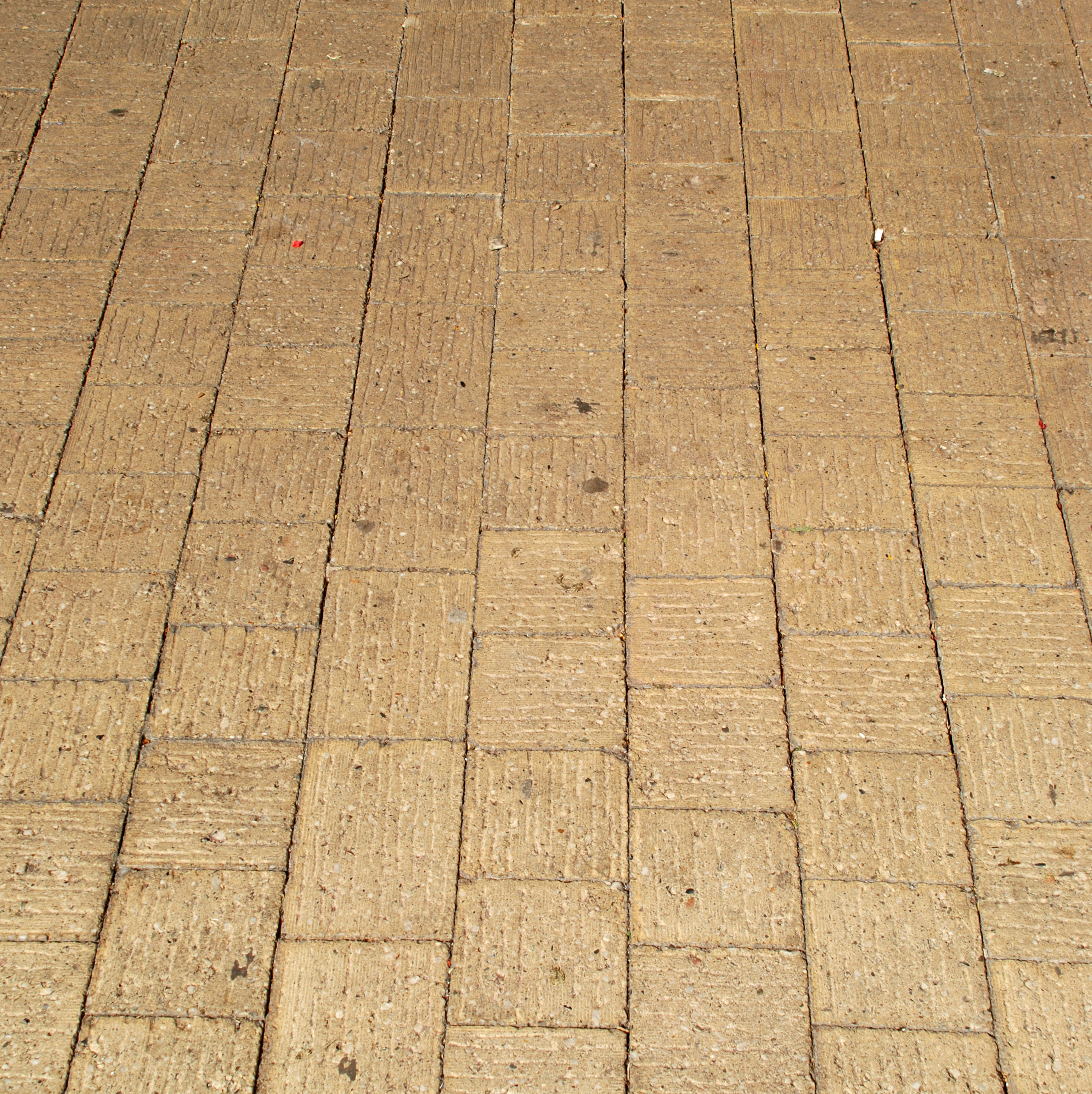 Belgique - Brabant wallon - Louvain-la-Neuve - Place de l'Université - Halles universitaires : pavés de béton blanc connus sous le nom de « Blanc de Bierges »